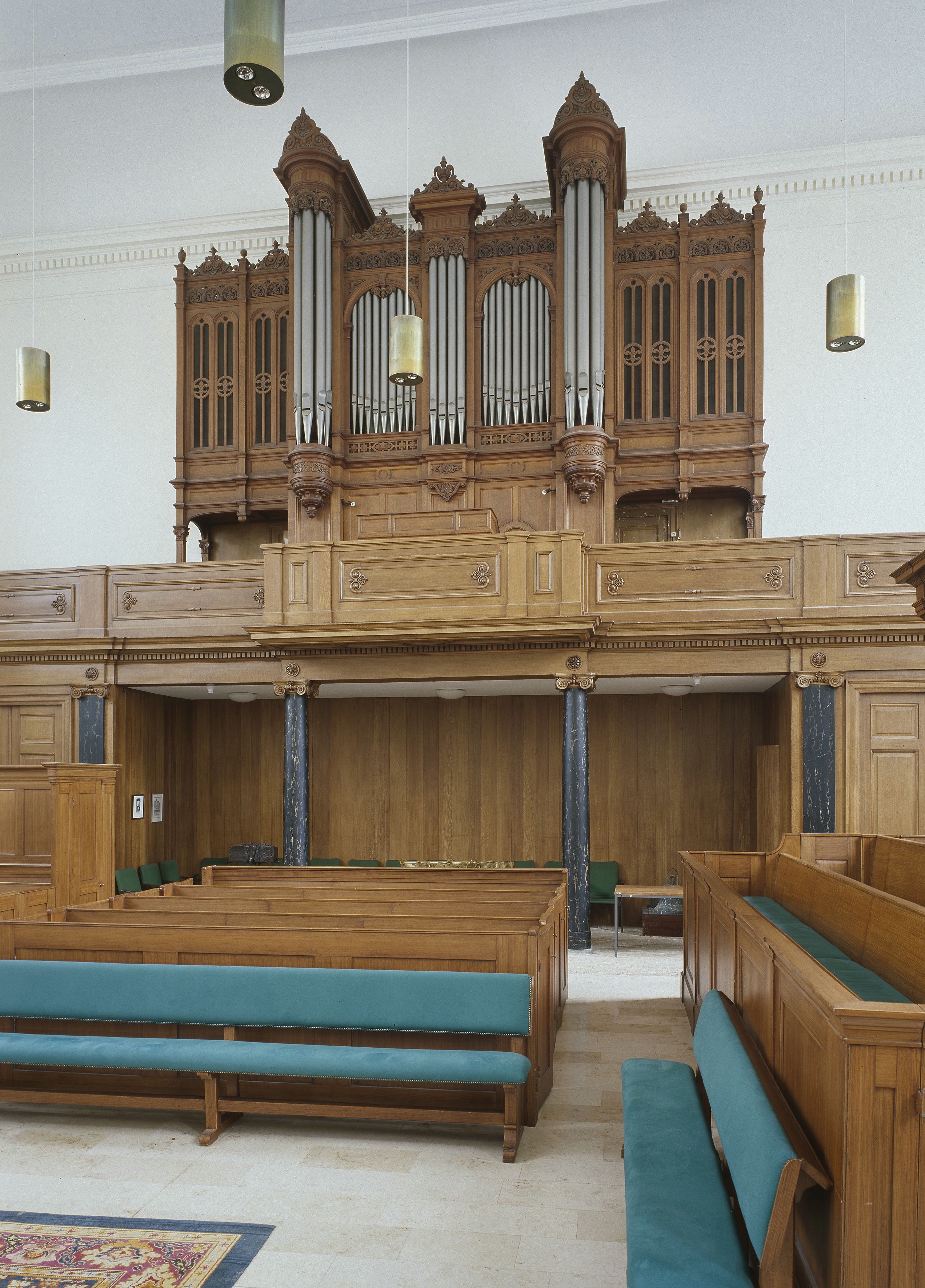 Waalse Kerk: Interieur, aanzicht orgel, orgelnummer 540 (opmerking: Gefotografeerd voor Het Historische Orgel in Nederland 1878-1886, Bladzijde 352)